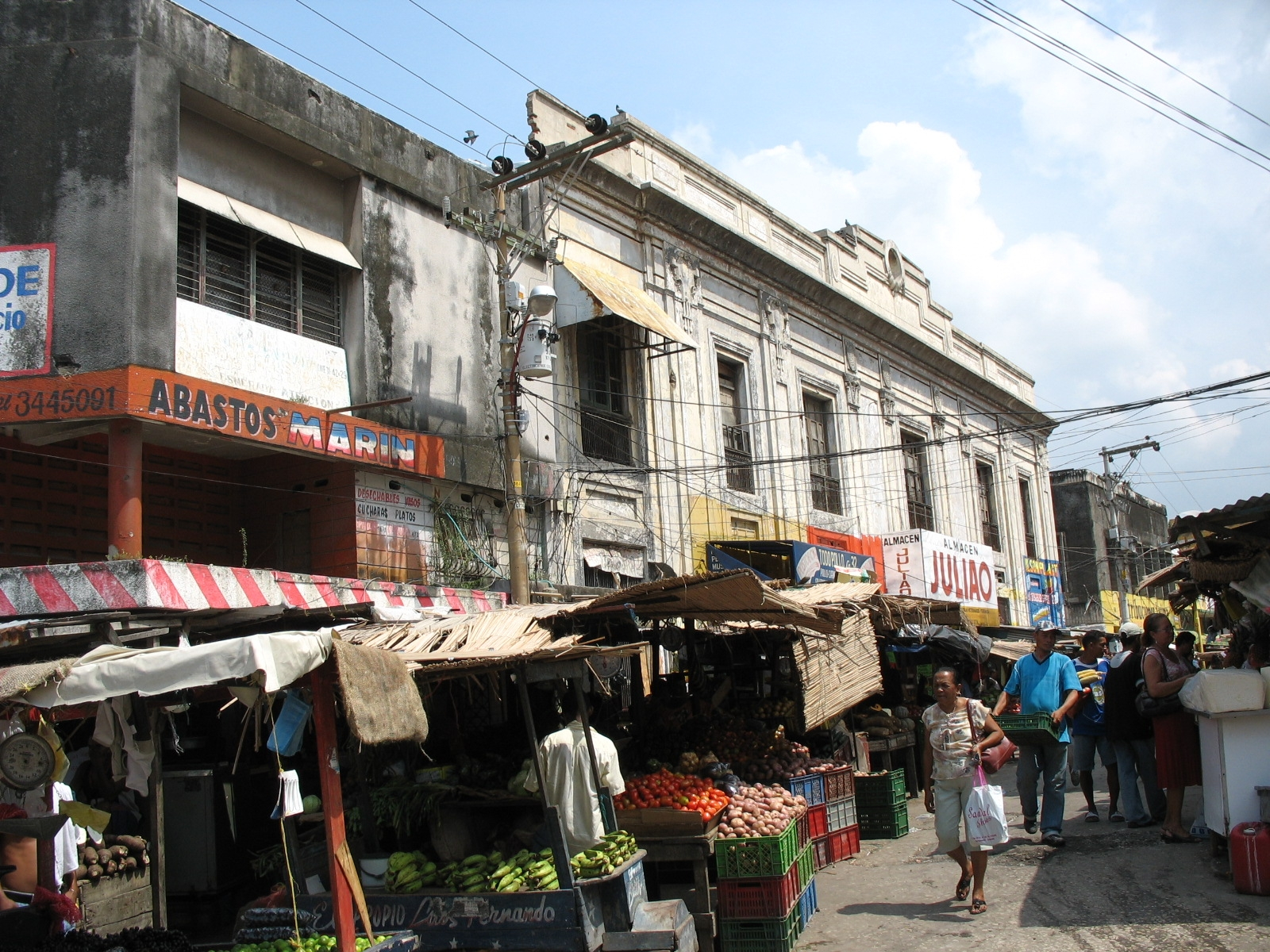 Estado del Centro de Barranquilla